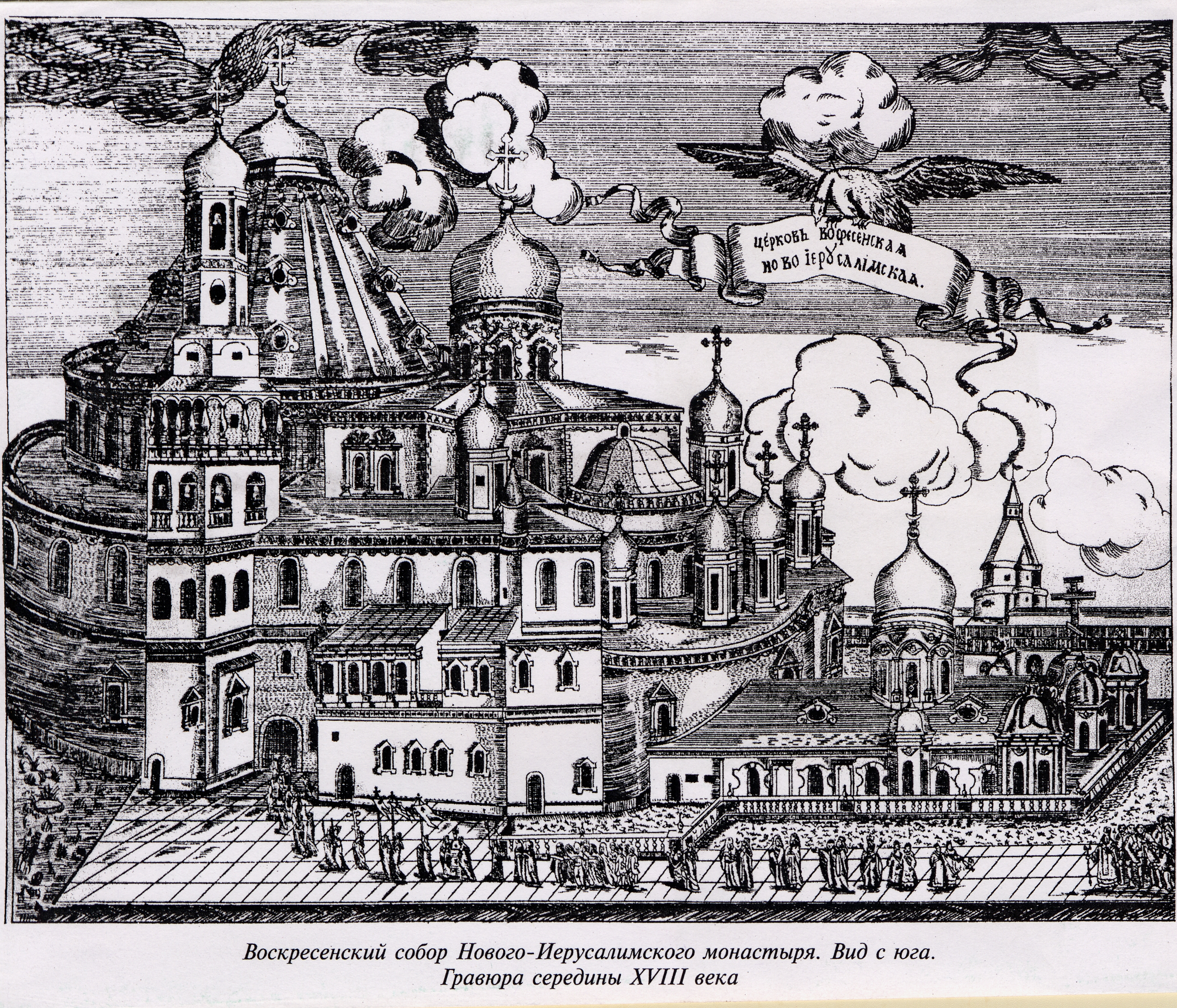 Посещение императрицей Елизаветой Петровной Новоиерусалимского монастыря. Гравюра. Середина XVIII века